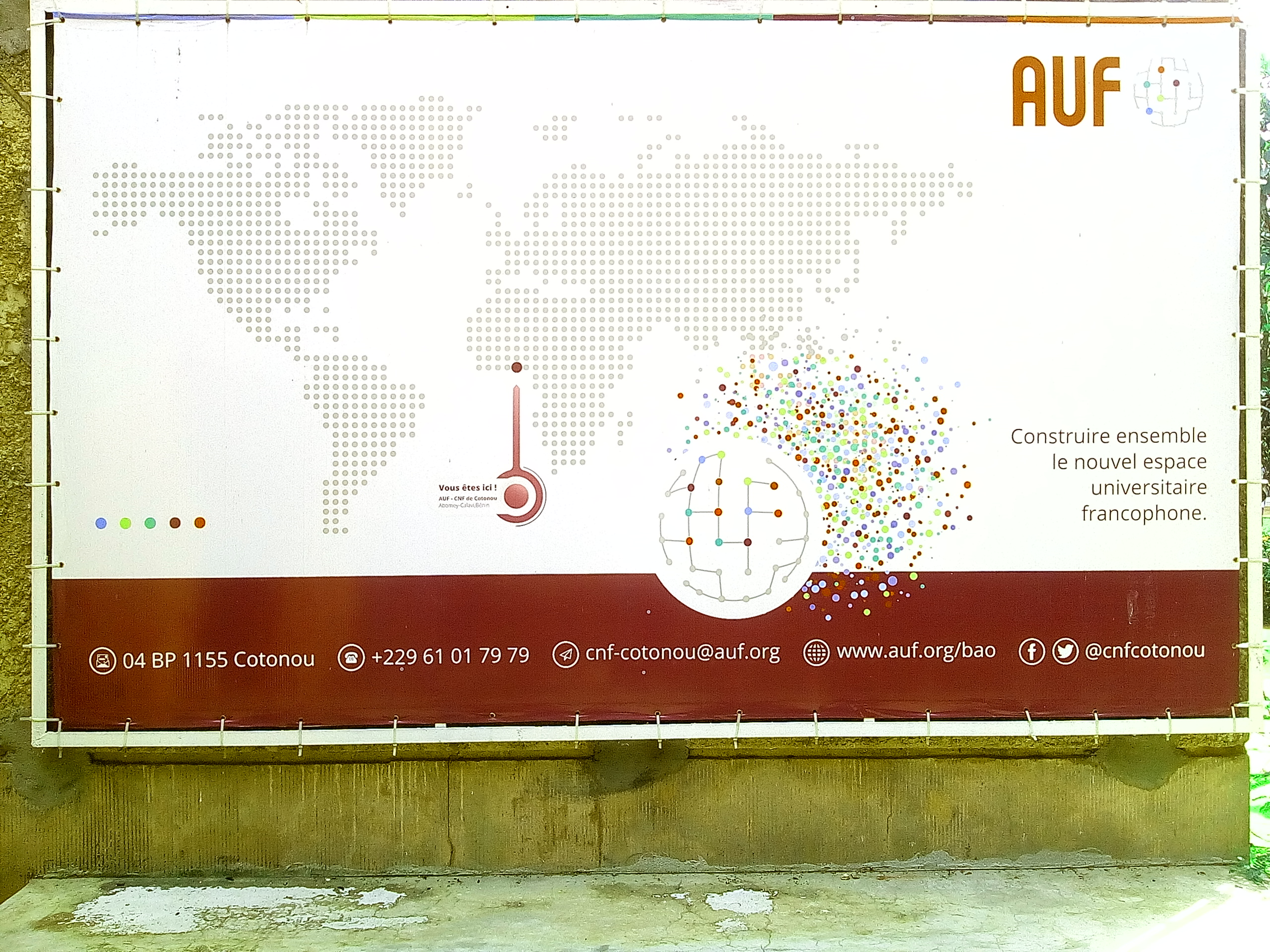 Orientation du cnf de Cotonou sur la carte.